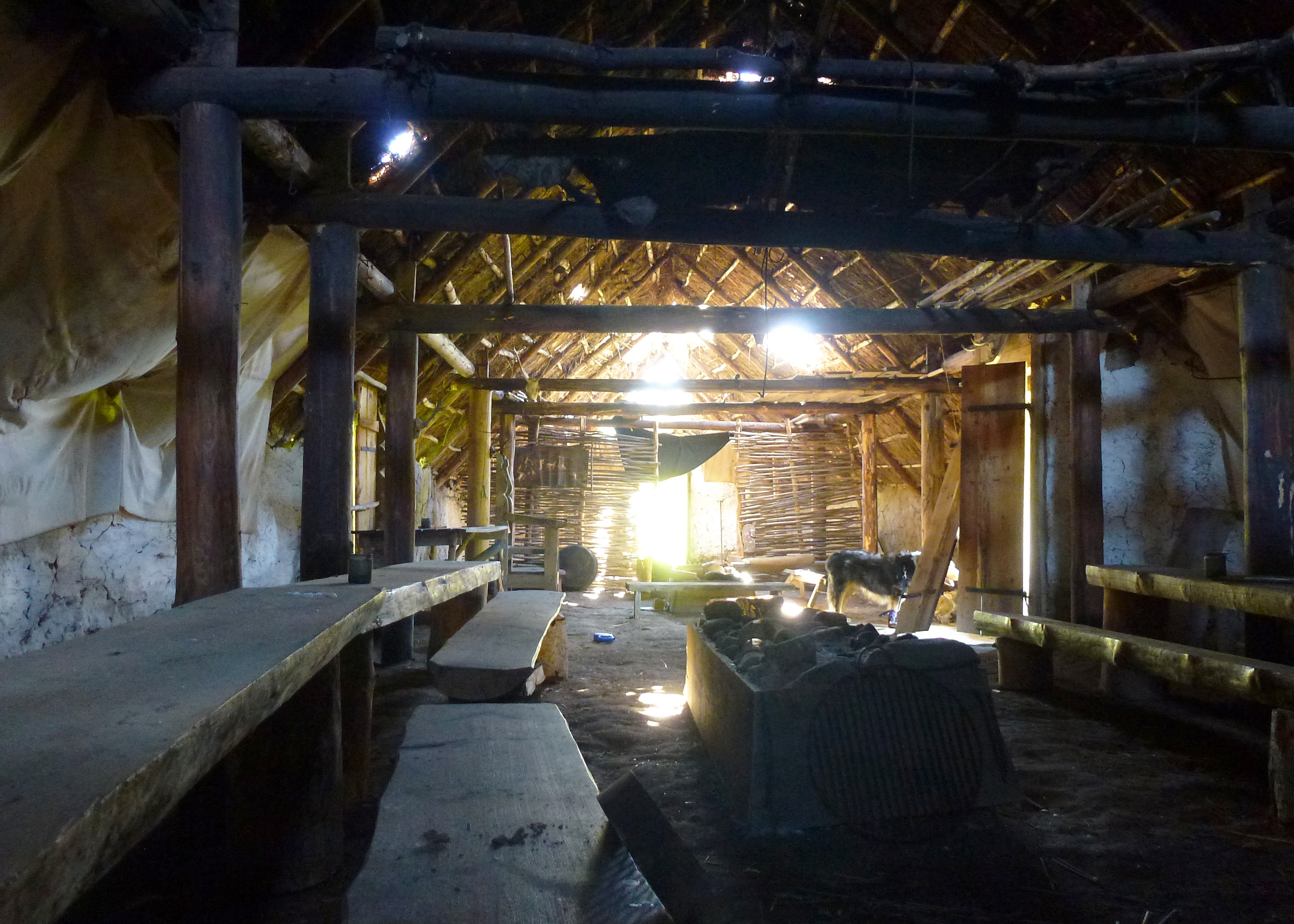 Järnåldershuset Körunda i Nynäshamnskommun